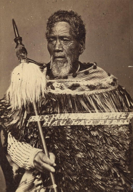 Chef Maori au taiaha. Maori chief holding a taiaha.